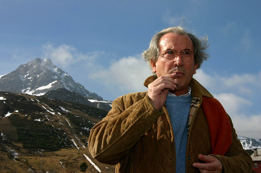 Juan Morano.